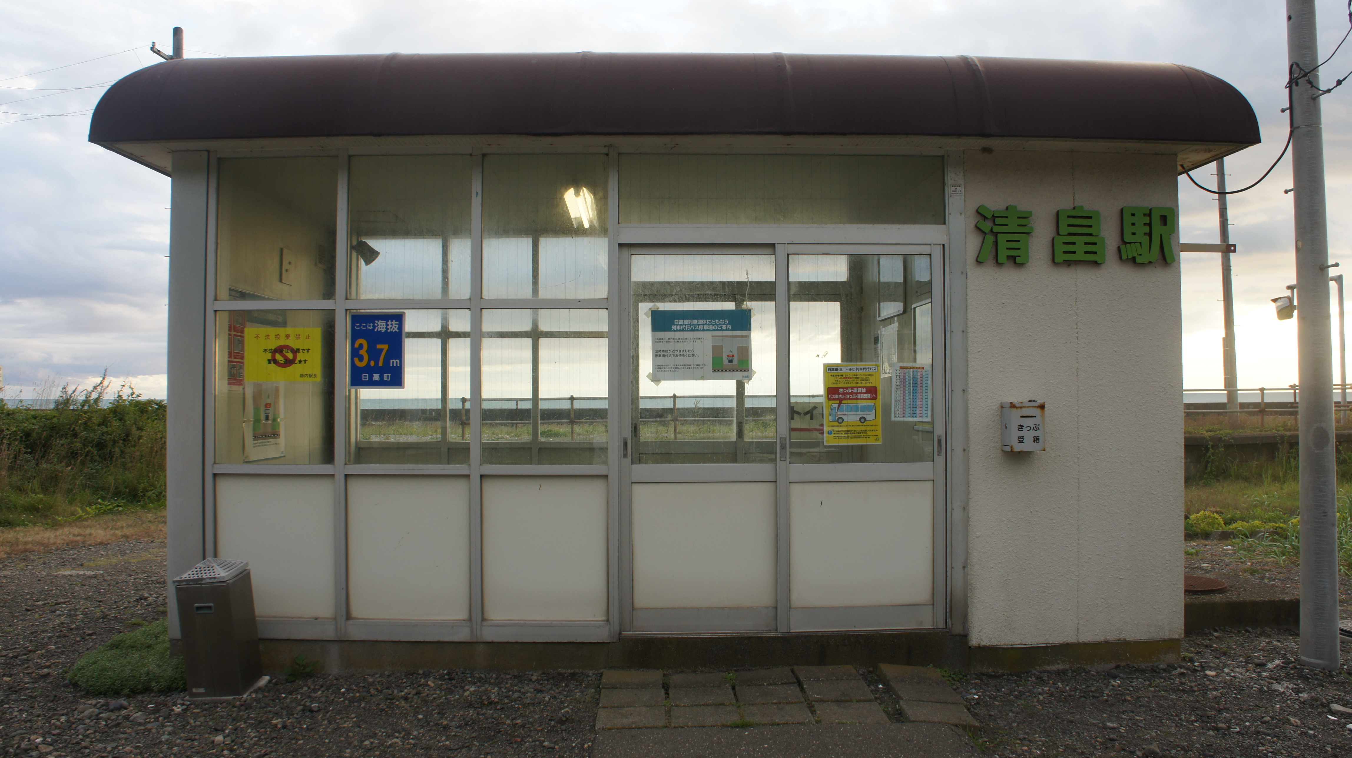 JR日高本線・清畠駅の駅舎